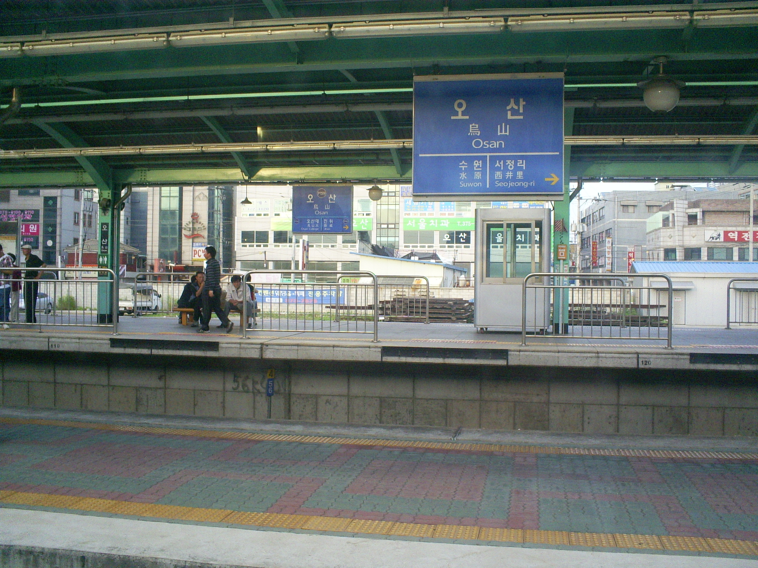 京釜線烏山駅の駅名板とホーム（停車中の幹線電気動車の車両内での撮影）